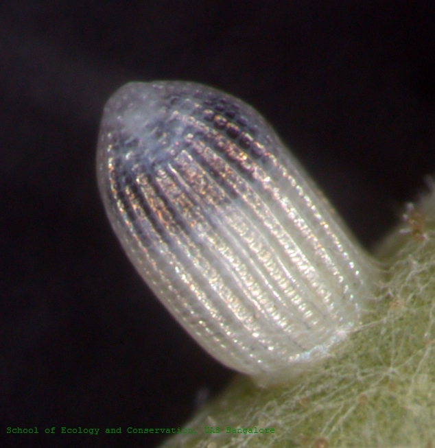 Tirumala septentrionis egg, India